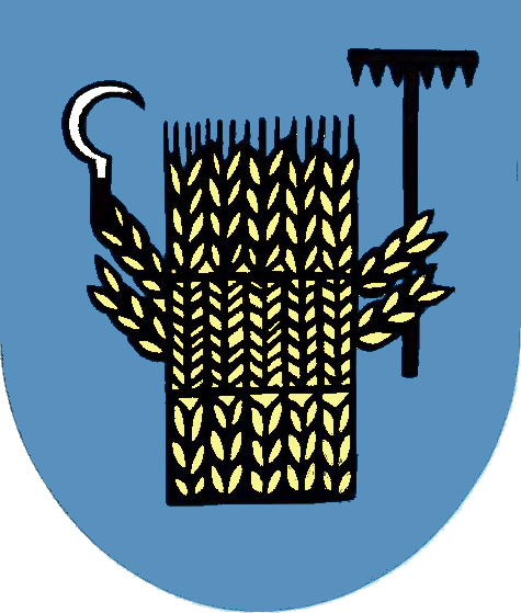 Herb Międzyrzecza Dolnego